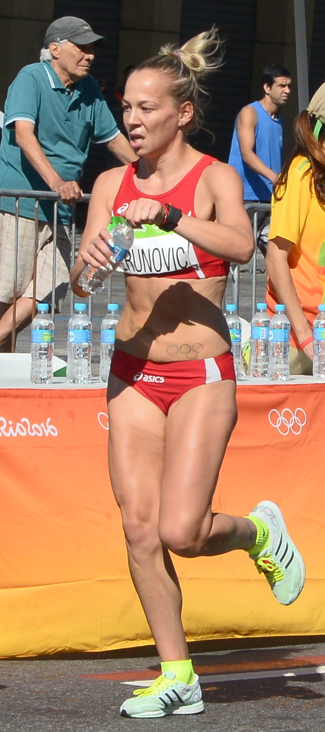 Passage du marathon des jeux olympiques de Rio 2016 dans le centre de Rio